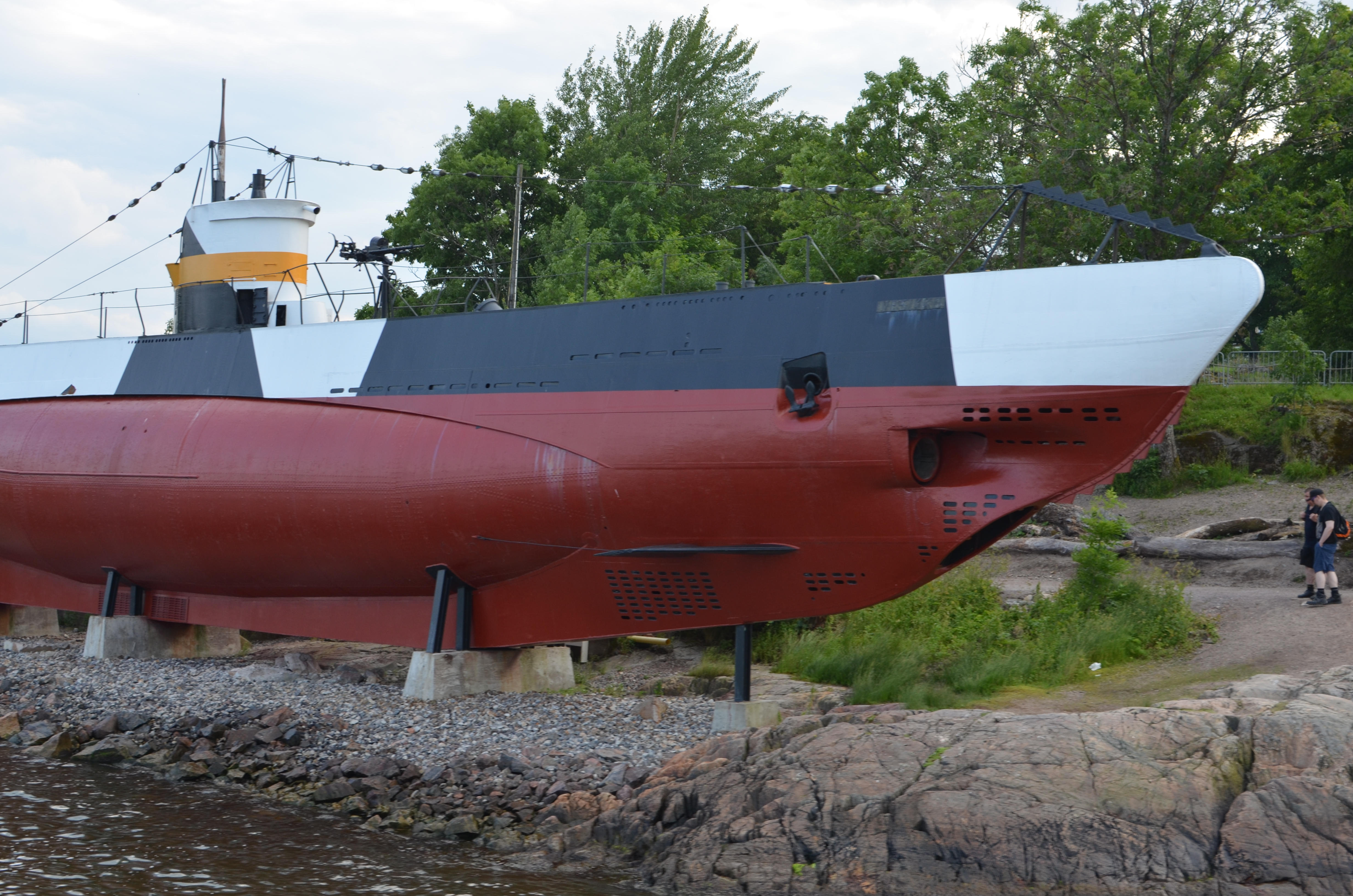 Suomenlinna